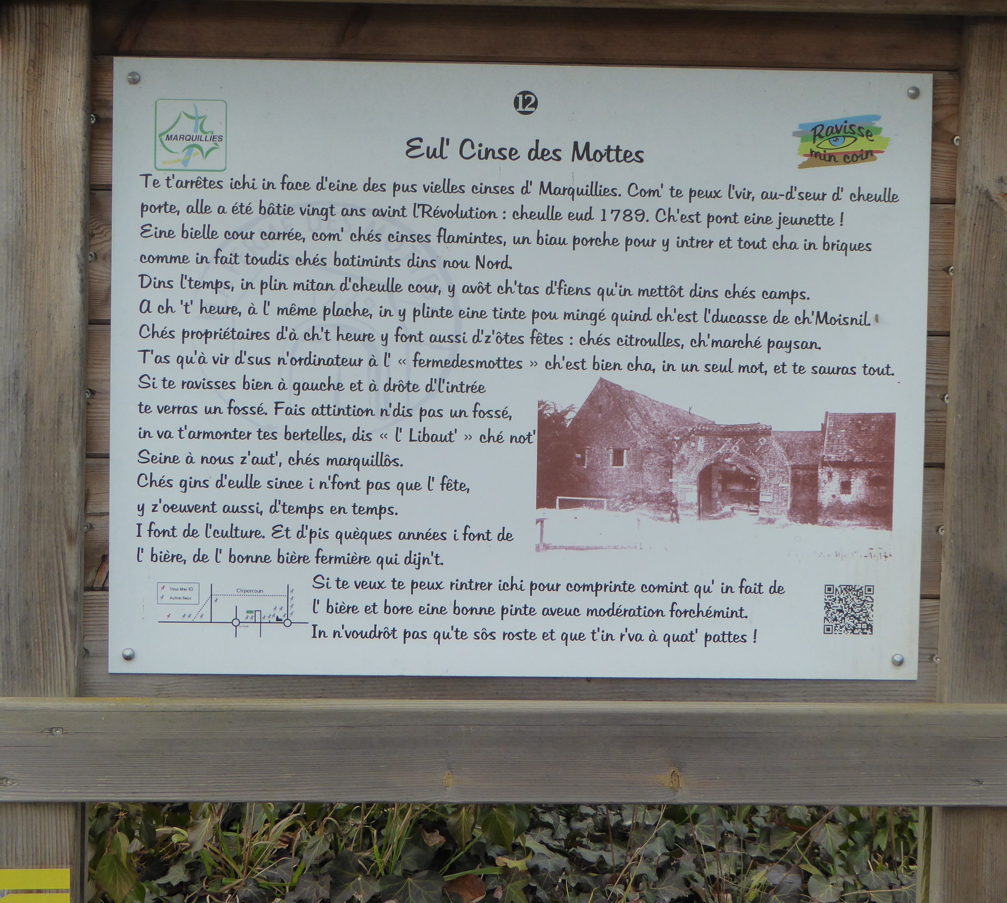 Tableau d'information en langue picarde relatif à la Cense des Mottes, Marquillies, France